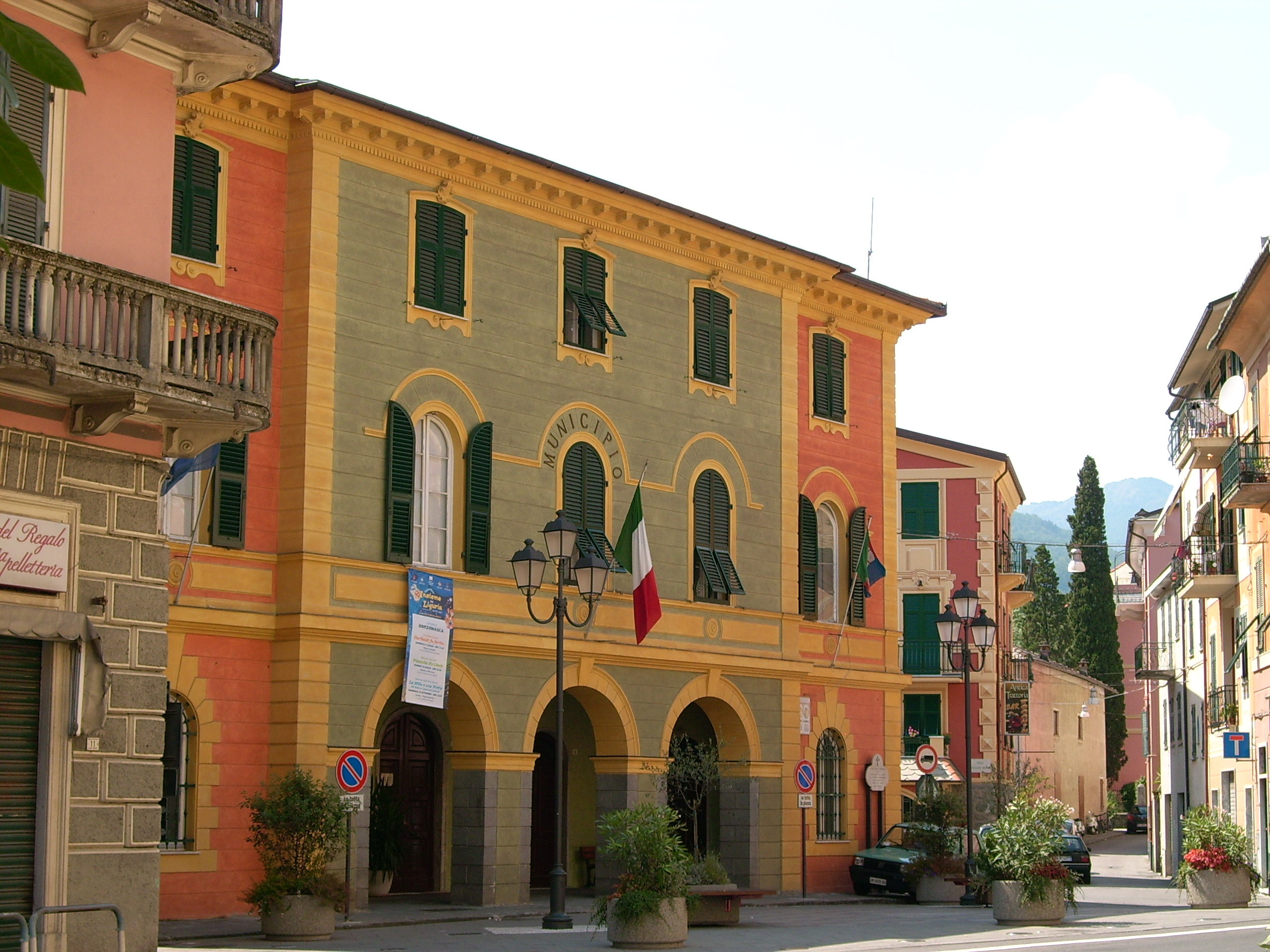 Municipio di Borzonasca, Liguria, Italia